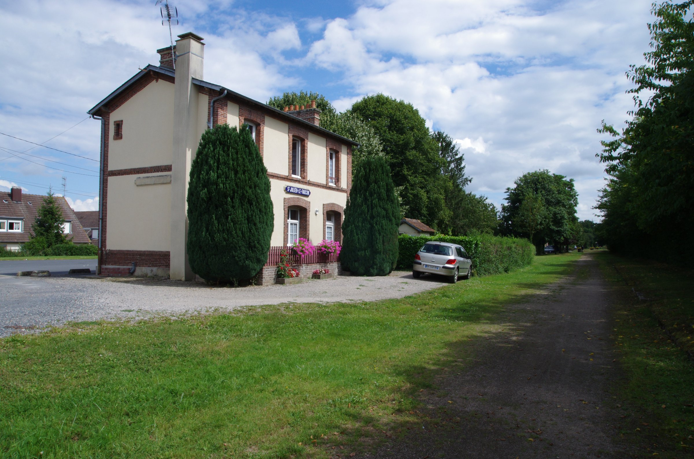 Gare saint julien le faucon 2015